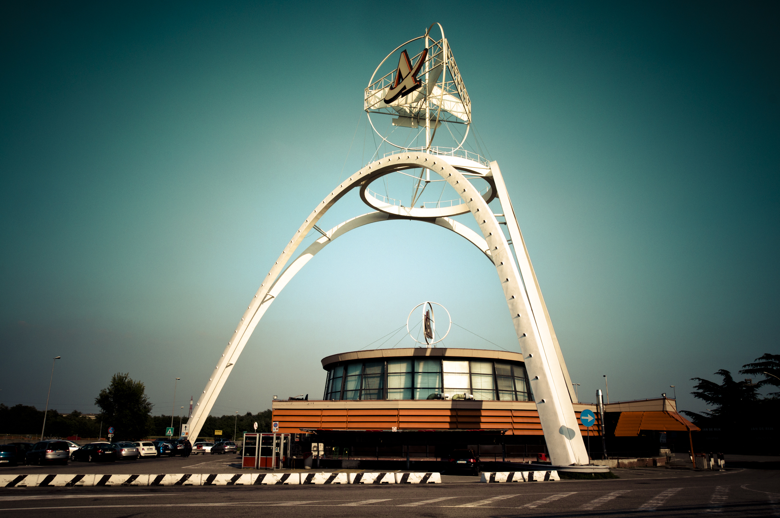 Autogrill di Lainate sull'autostrada Milano-Laghi